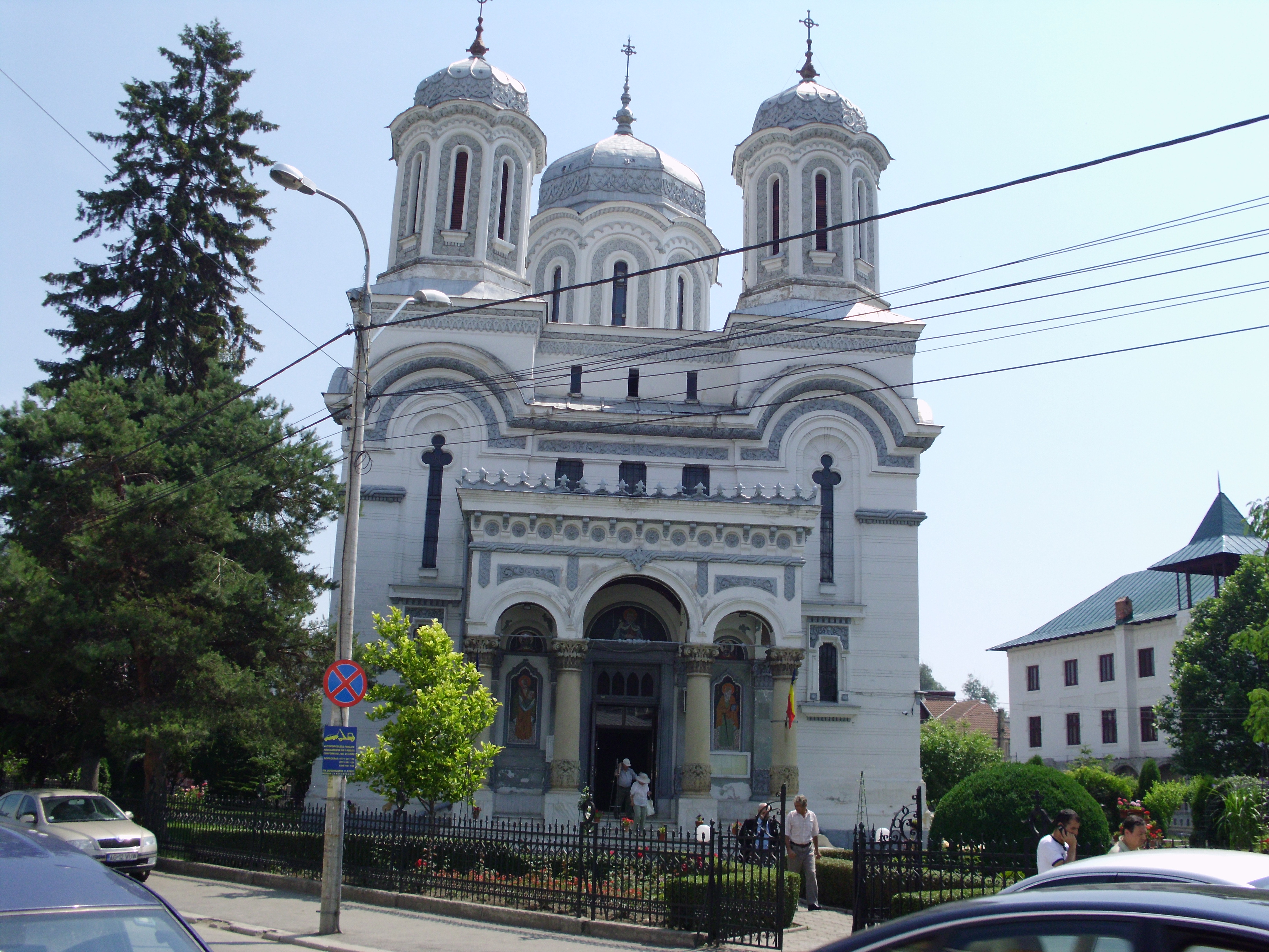 Ansamblul bisericii "Sf. Vineri"